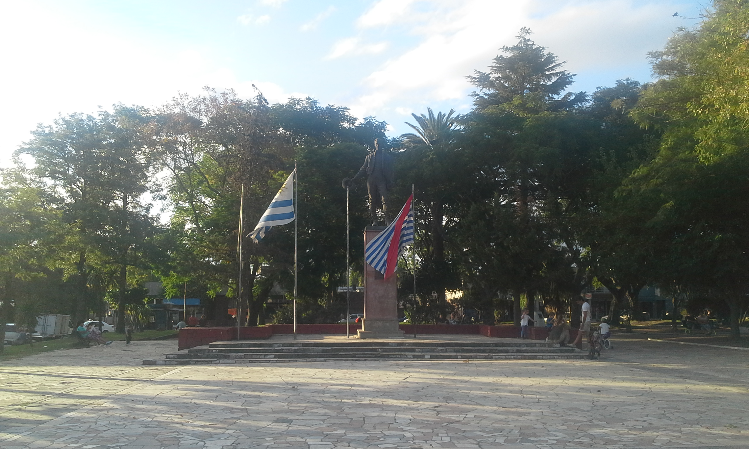 Conjunto del monumento a Artigas, en la Plaza central de Sauce, Canelones, Uruguay.